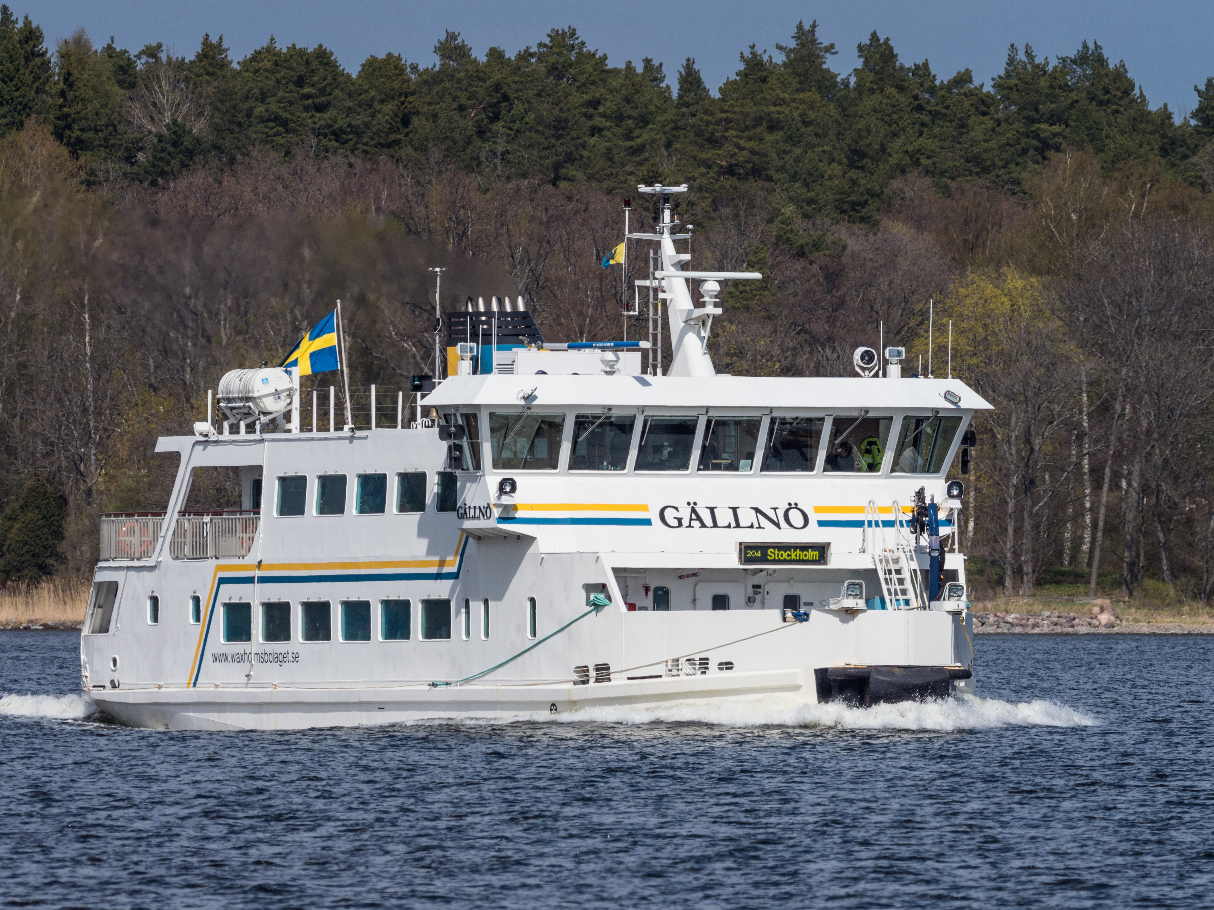 Gällnö